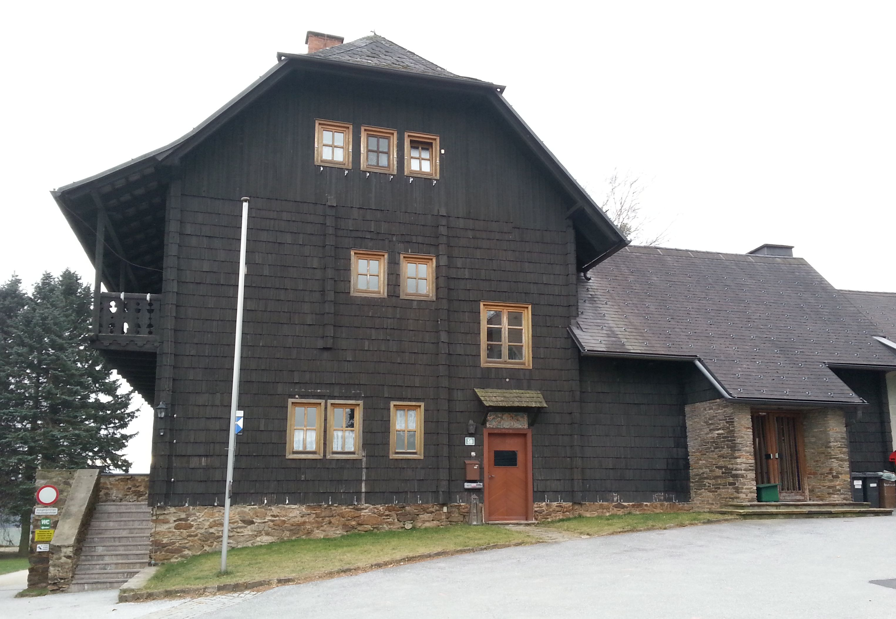 Ehem. Gemeindeamt